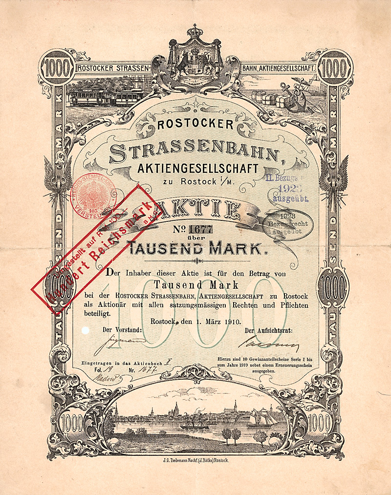 Aktie über 1000 Mark der Rostocker Straßenbahn AG vom 1. März 1910